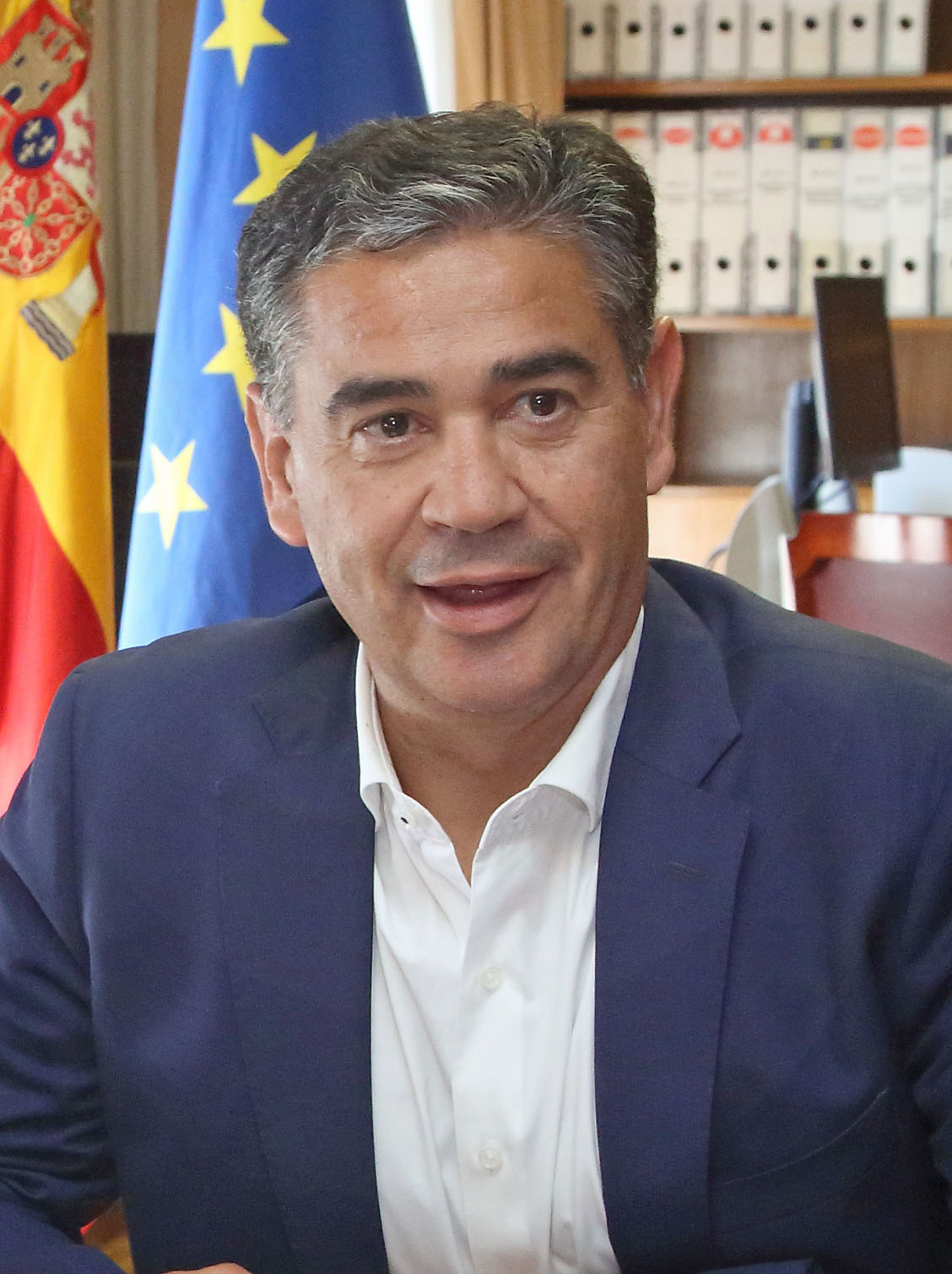 Toledo, 30 de julio de 2018.- La directora del Instituto de la Mujer, Araceli Martínez, durante la reunión que ha mantenido hoy con el delegado del Gobierno en Castilla-La Mancha, Manuel González Ramos, en la sede de la Delegación, en Toledo. (Foto: Álvaro Ruiz // JCCM)